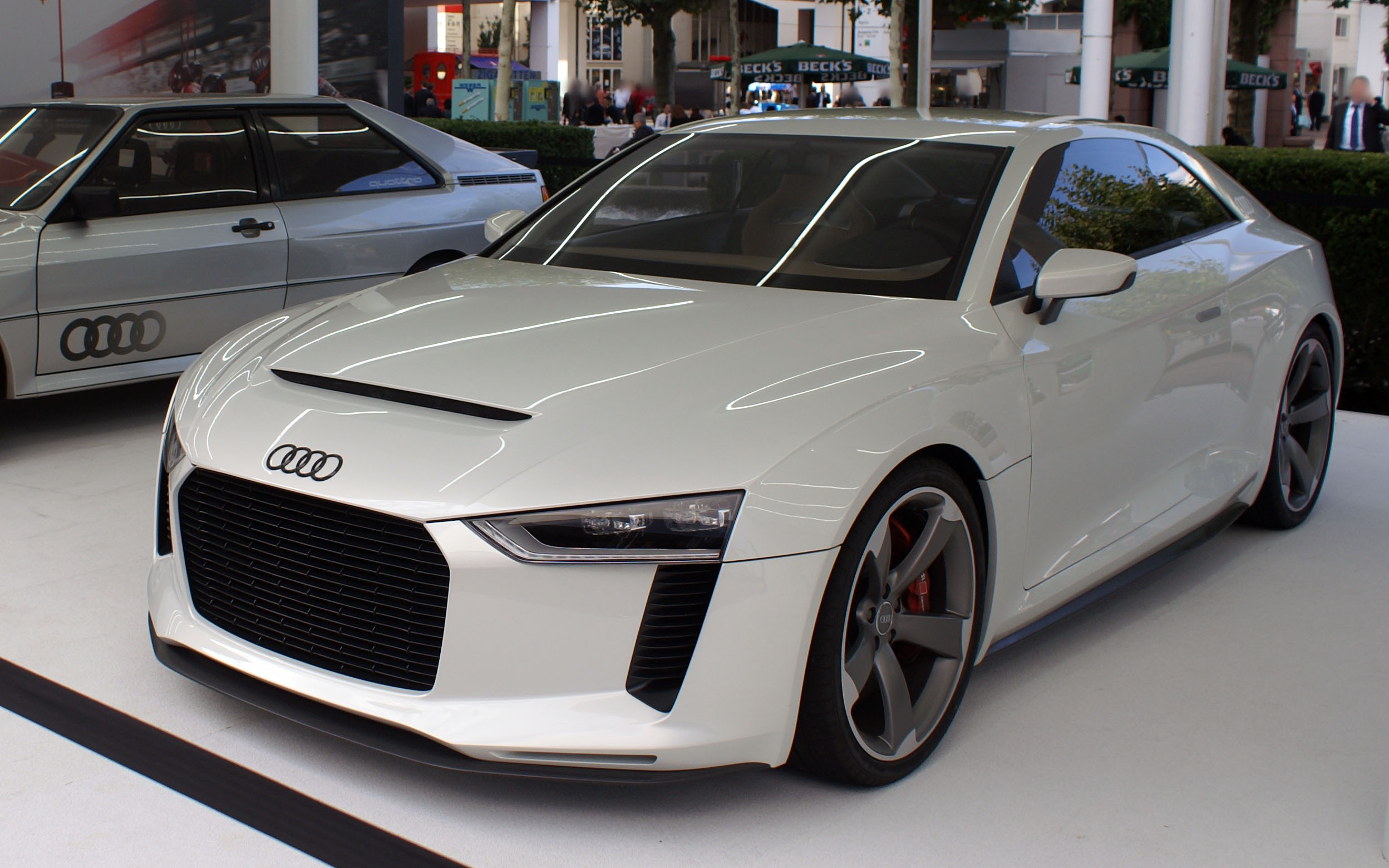 Audi Quattro Concept, IAA 2011.